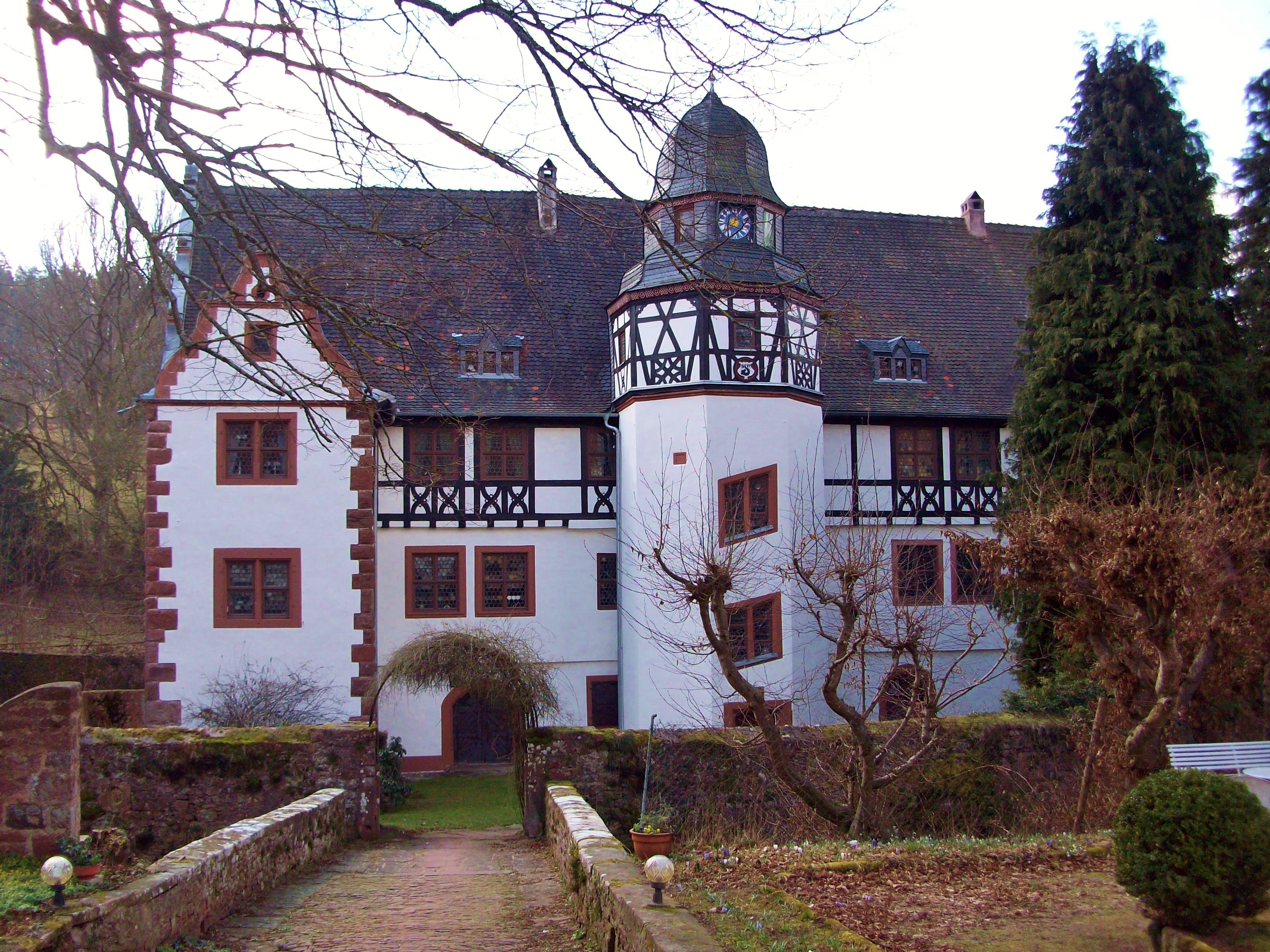 Wasserschloss Oberaulenbach, Norostseite, Eingang